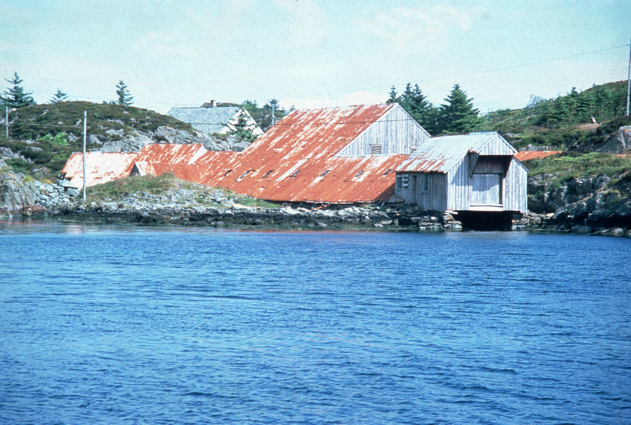 Espevær hummerpark (Bømlo kommune). Ukjent fotograf. Fra Riksantikvarens Kulturminnesøk.